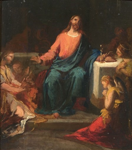 "Gesù benedice il pane e il vino", olio su tavola, 30 x 26.5 cm., firmato, coll. privata